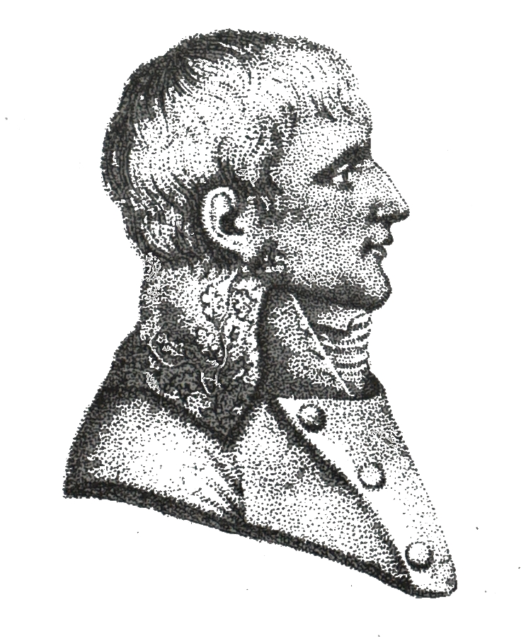 d'après le dessin de J. Cossard, gravure de sa main, impression E. Caffé, 27 rue du Temple à Troyes.